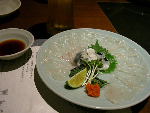 Fugu Sashimi